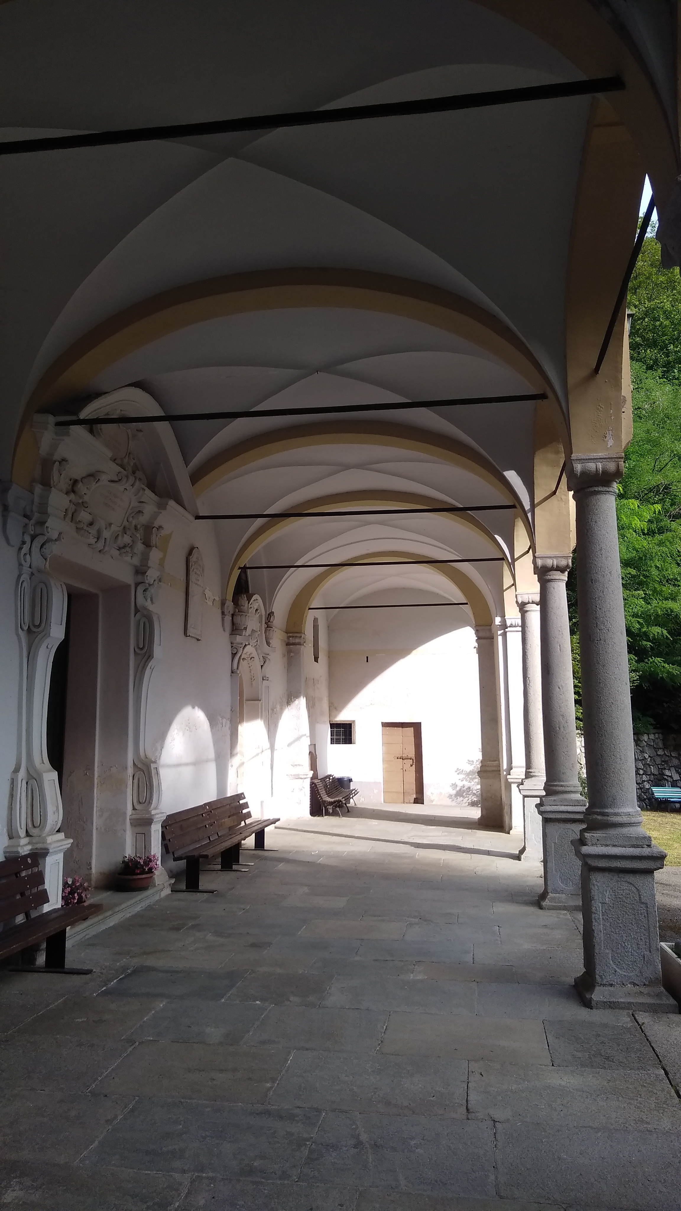 Santuario della Madonna della Fontana (Azoglio): porticato